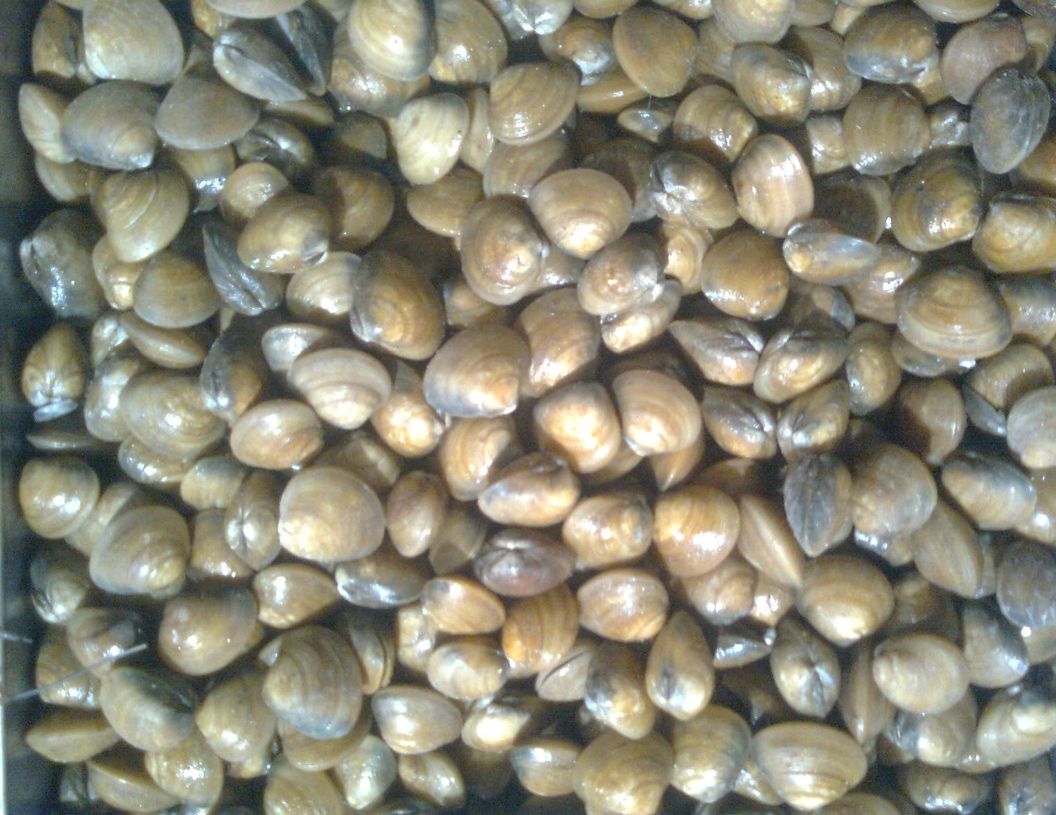 കക്ക തോടോടുകൂടിയത്